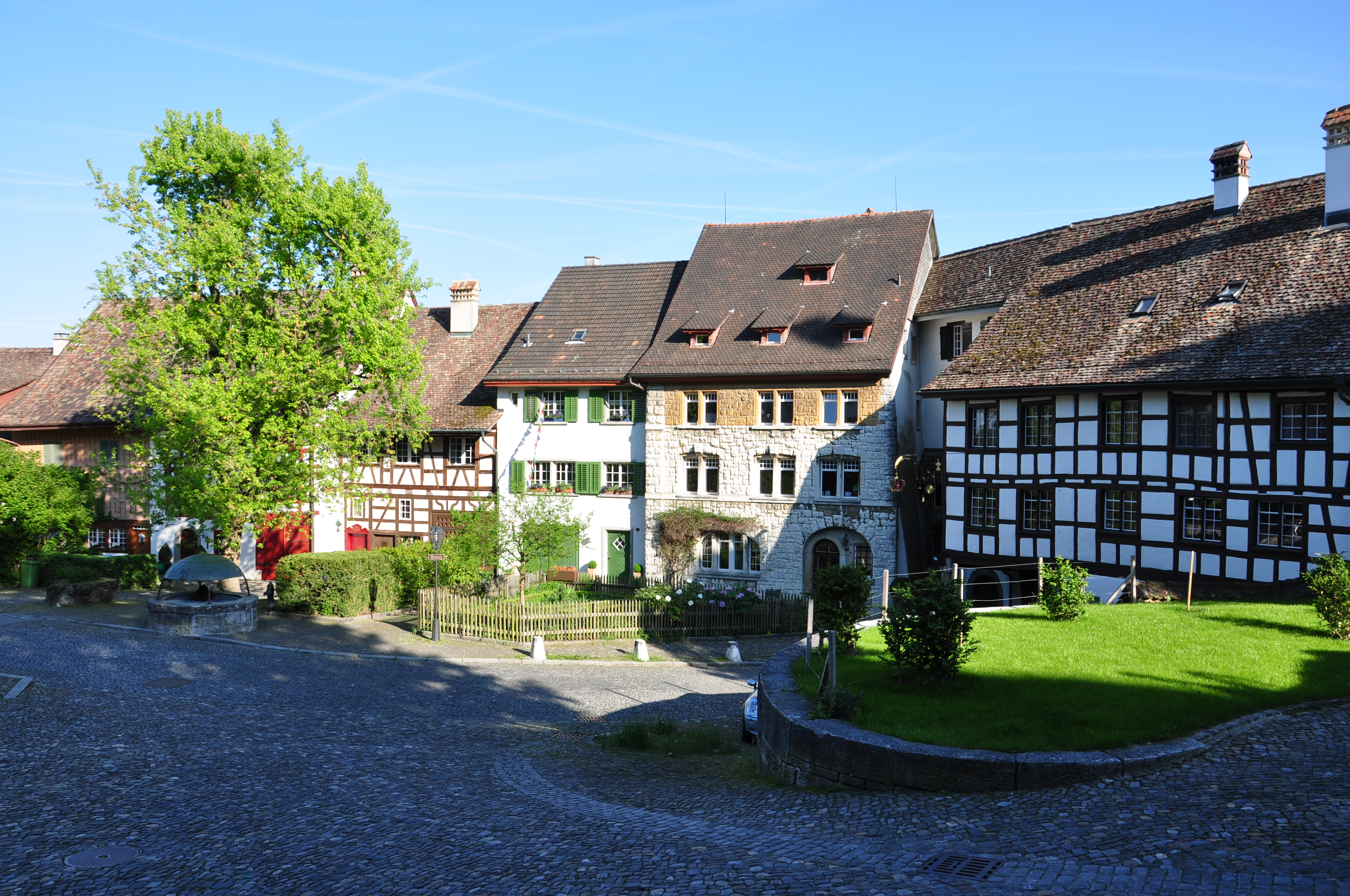 Oberburg in Regensberg (Switzerland)